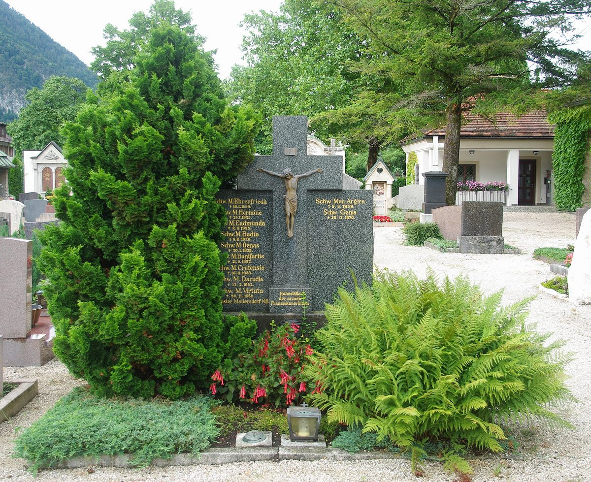 Grabstelle der Armen Franziskanerinnen auf dem Friedhof St. Zeno in 83435 Bad Reichenhall. Steinmetz/Erbauer unbekannt.